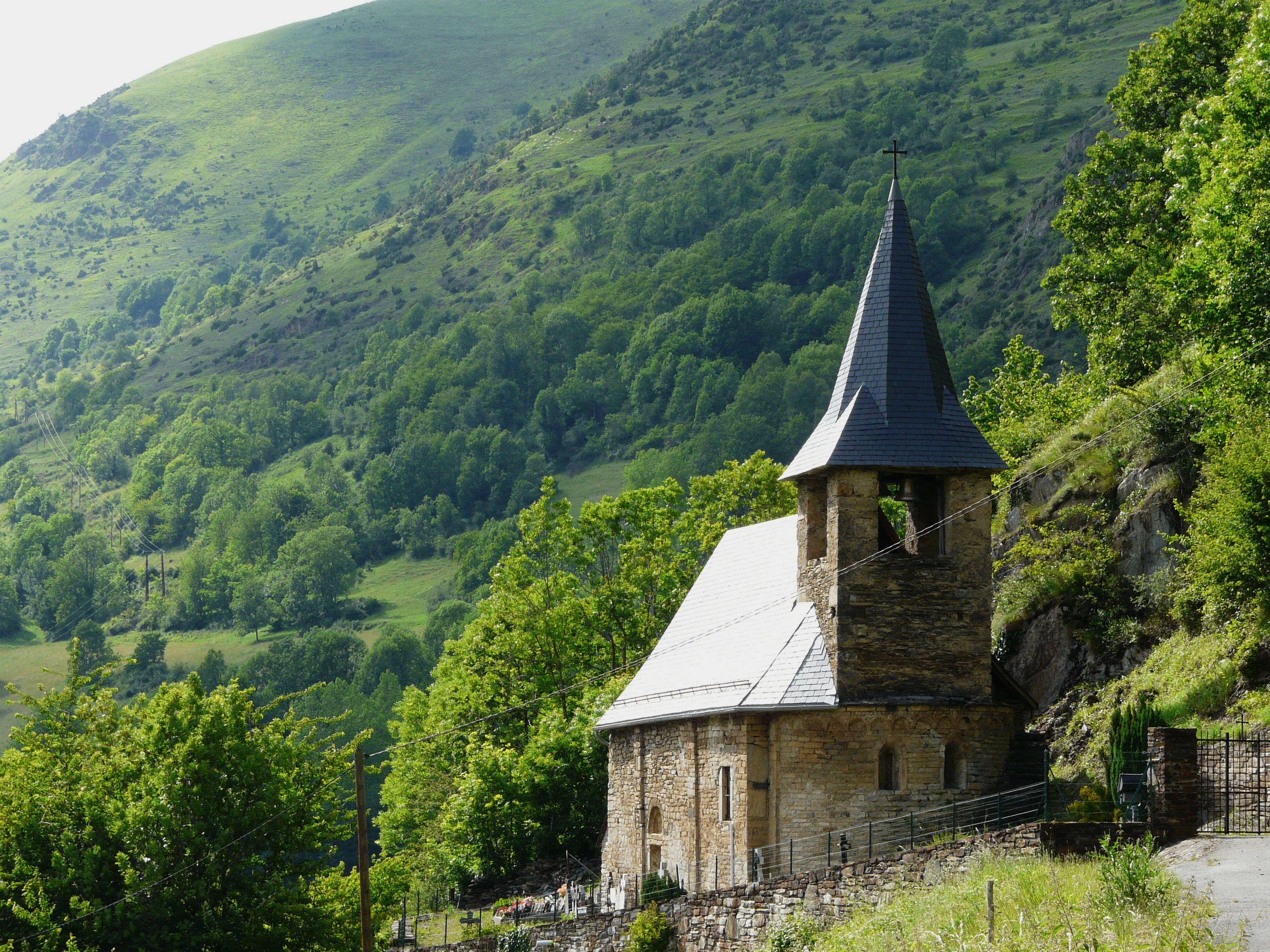 L'église Saint-Julien vue depuis le sud-est, Trébons-de-Luchon, Haute-Garonne, France.